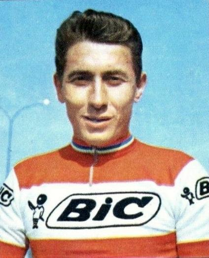 Jacques Anquetil en 1968 - PANINI 1969/1970, n°170